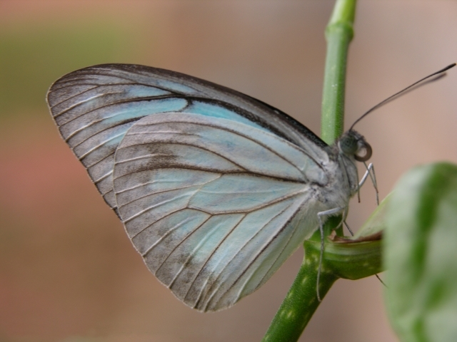 Pareronia valeria, adult, India